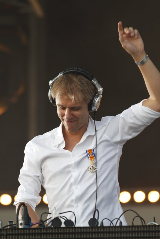 Nederlandse DJ